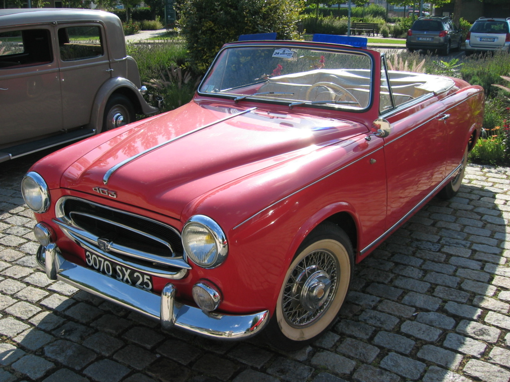 Peugeot 403 cabriolet - Musée Peugeot Sochaux